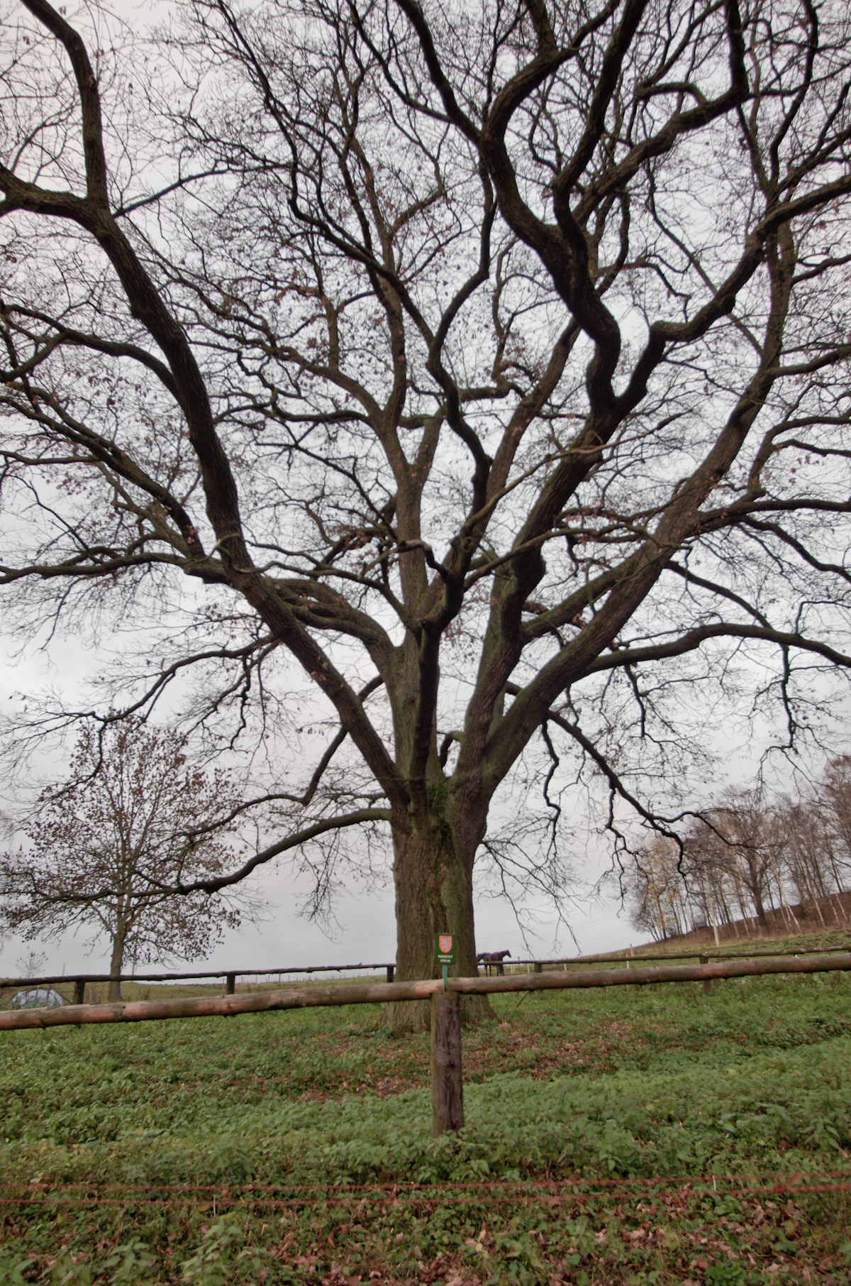 Novina, Slavkovský les, památný strom - dub na okraji pastviny u příjezdové cesty na Novinu, nádherně rostlý solitérní dub, široká koruna, rovný kmen; výška 21 m, obvod kmene 390 cm (údaje z roku 2004)